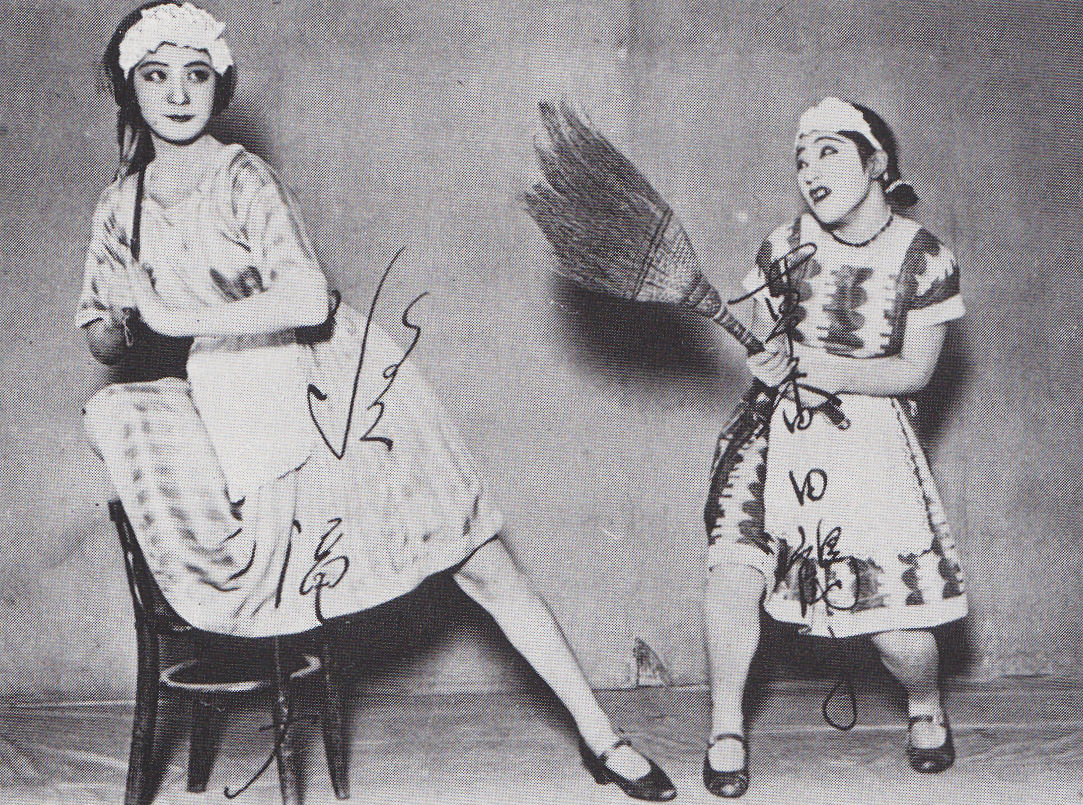 東京松竹楽劇部、1930年11月演目『サーバント・クラブ』一場面。水の江瀧子（左）と草香田鶴子（右）。